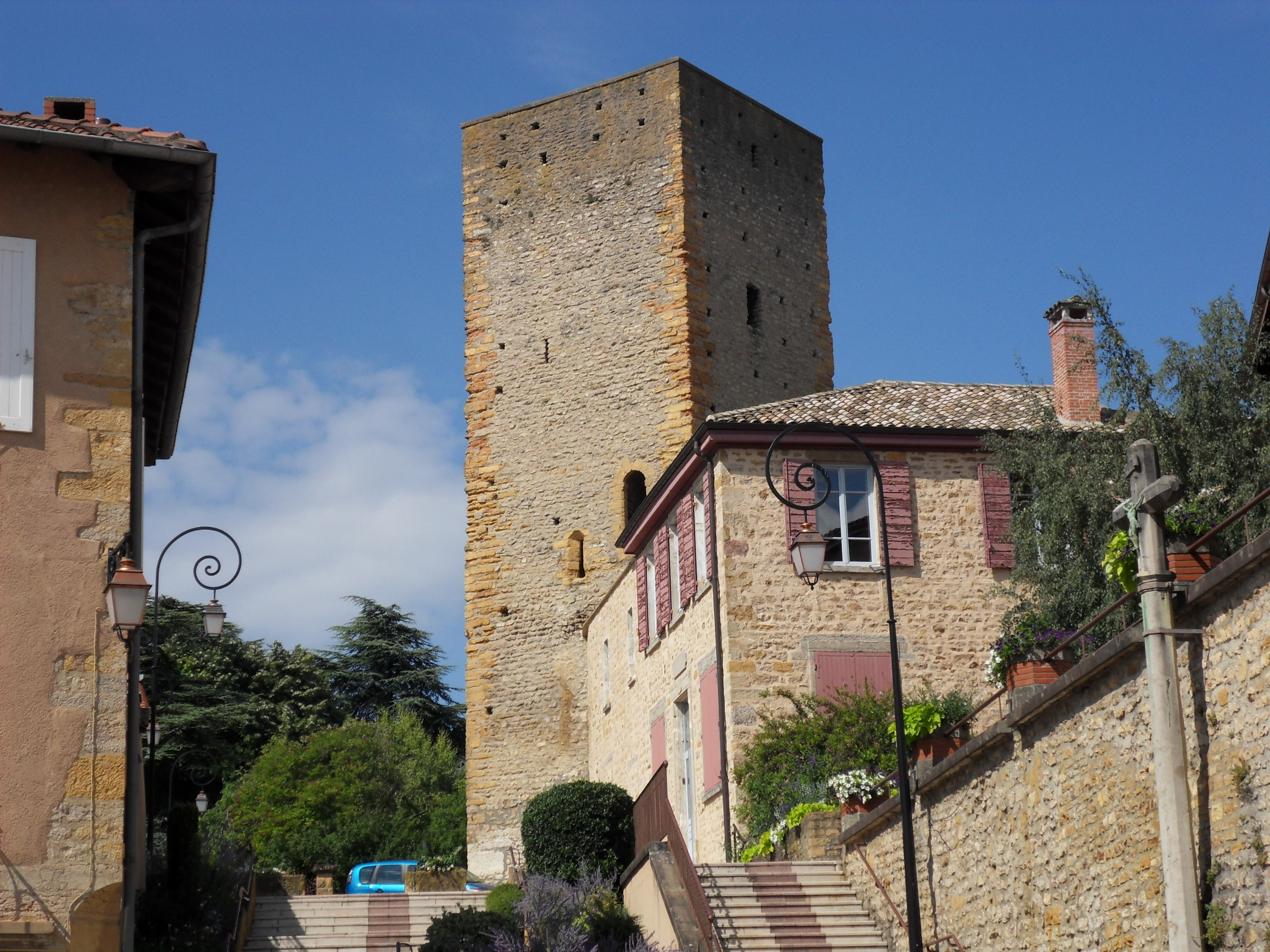 Tour du château de Saint-Cyr (été 2011)